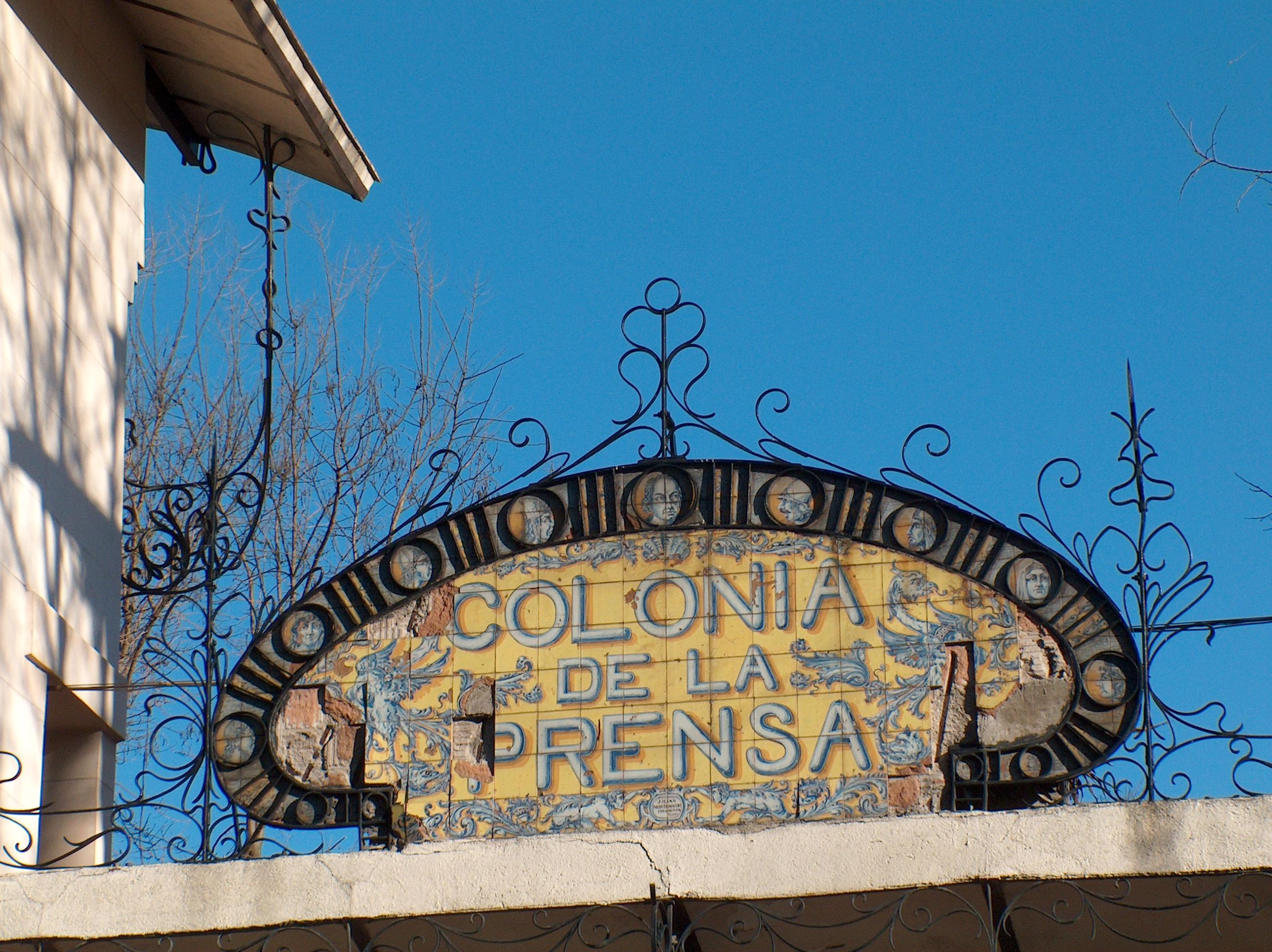 La Colonia de la Prensa: enseña en entrada de la Calle Eugenia de Montijo, 61-63 - Madrid, España.